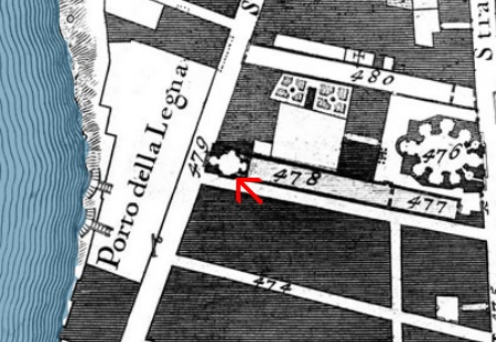 dalla Nuova Topografia di Roma di Giovanni Battista Nolli (1748), foglio 2.I numeri identificano: n. 476 Chiesa di S. Giacomo degl'Incurabili (Francesco Capriani e Carlo Maderno, 1590-1601) n. 477 Spedale per le donne (1580s) n. 478 Spedale per gli uomini (1580s) n. 479 Chiesa di S. Maria in Porta Paradisi (Antonio da Sangallo il Giovane, 1523) n. 480 Sped. dismesso di S. Giacomo sud. (Francesco Capriani e Carlo Maderno, 1590-1601)